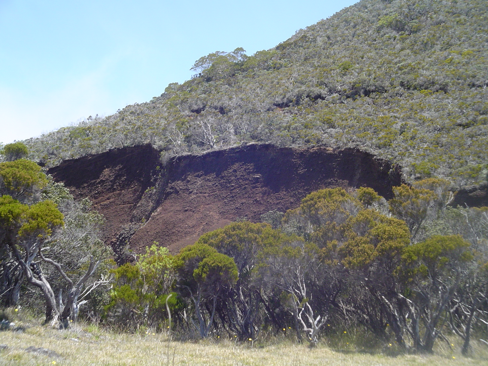 Soil erosion